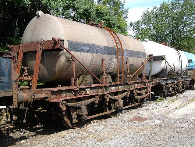 Milk Tank Wagons.